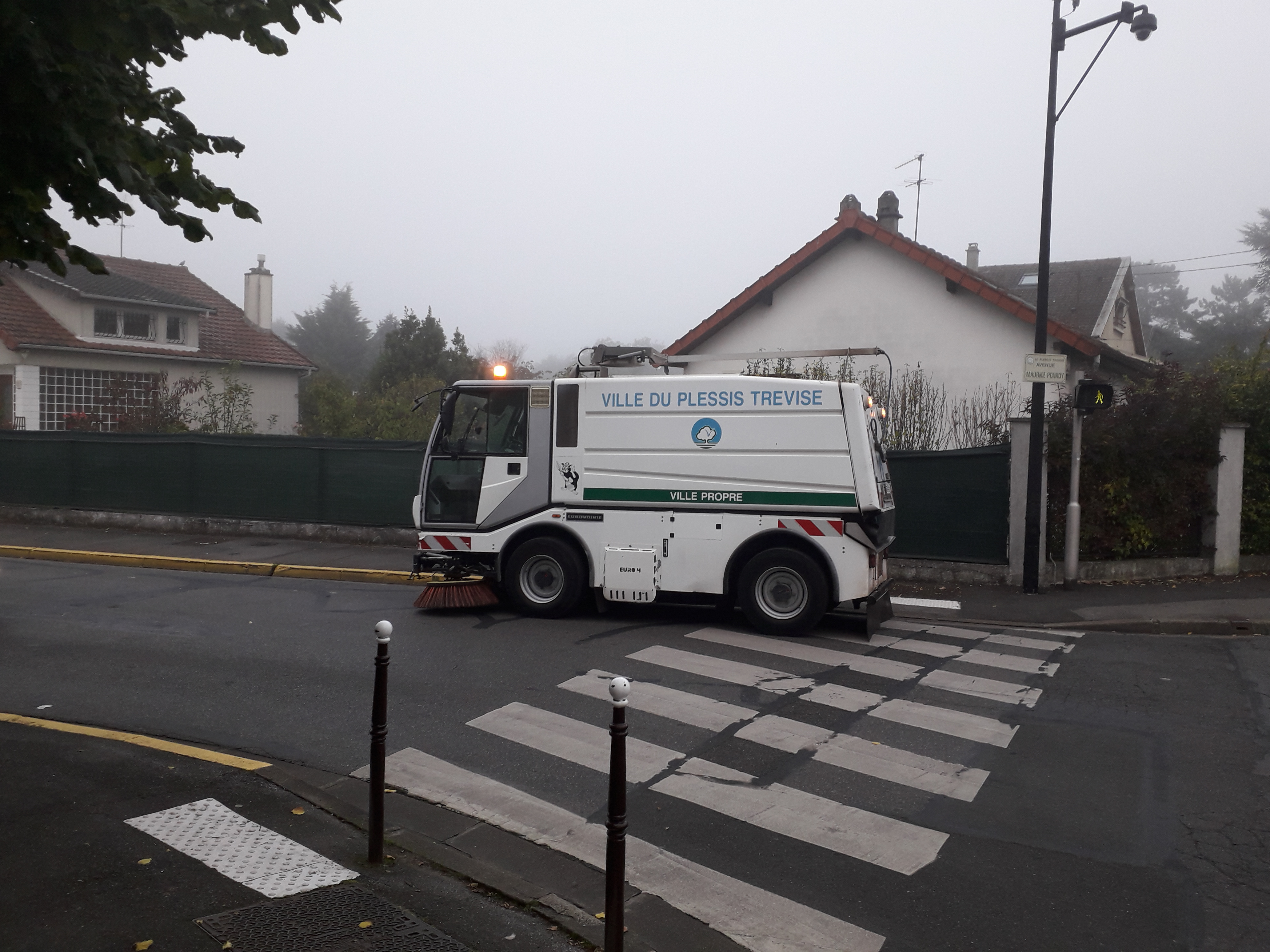 Camionnette de la ville du Plessis-Trévise quittant l'avenue Maurice Berteaux pour tourner avenue Maurice Ponroy.